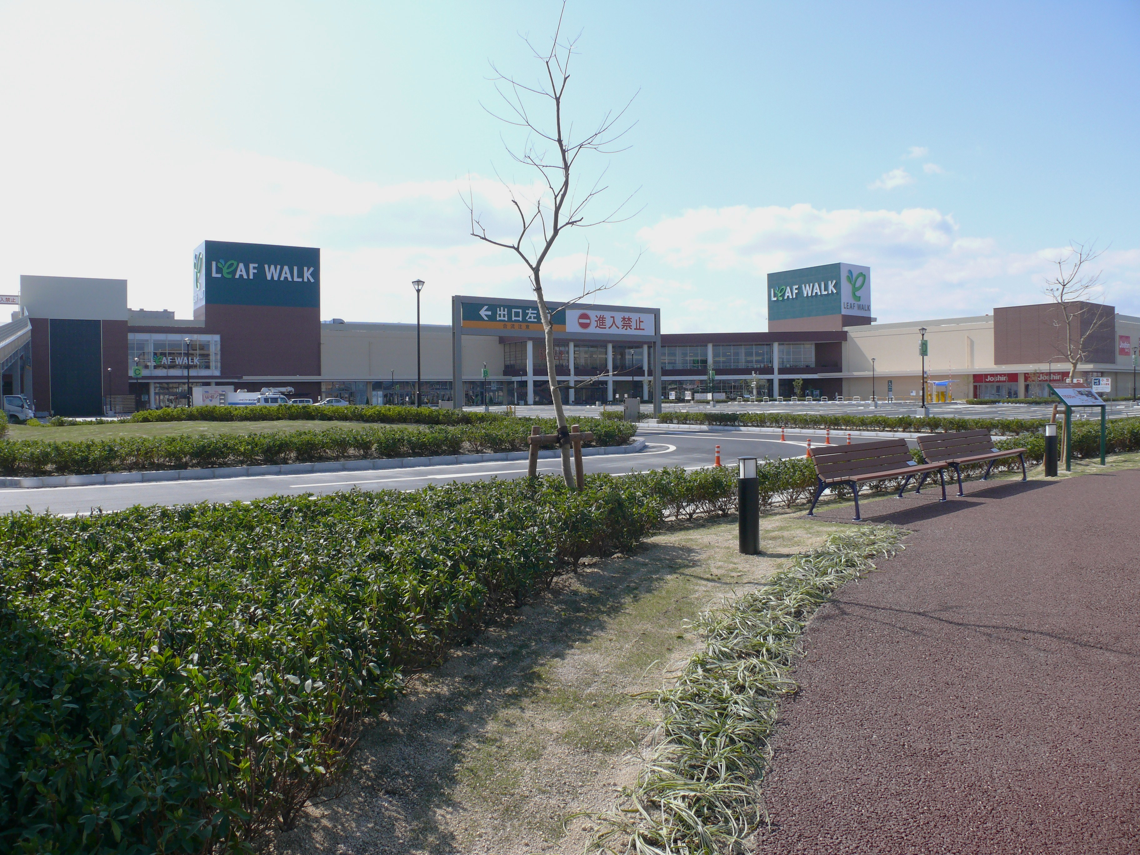 リーフウォーク稲沢（アピタ稲沢東店）